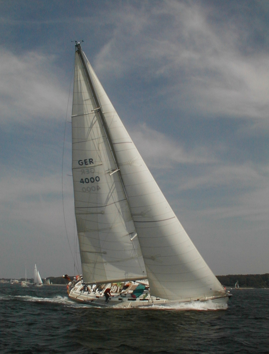 Peter von Danzig sailing upwind